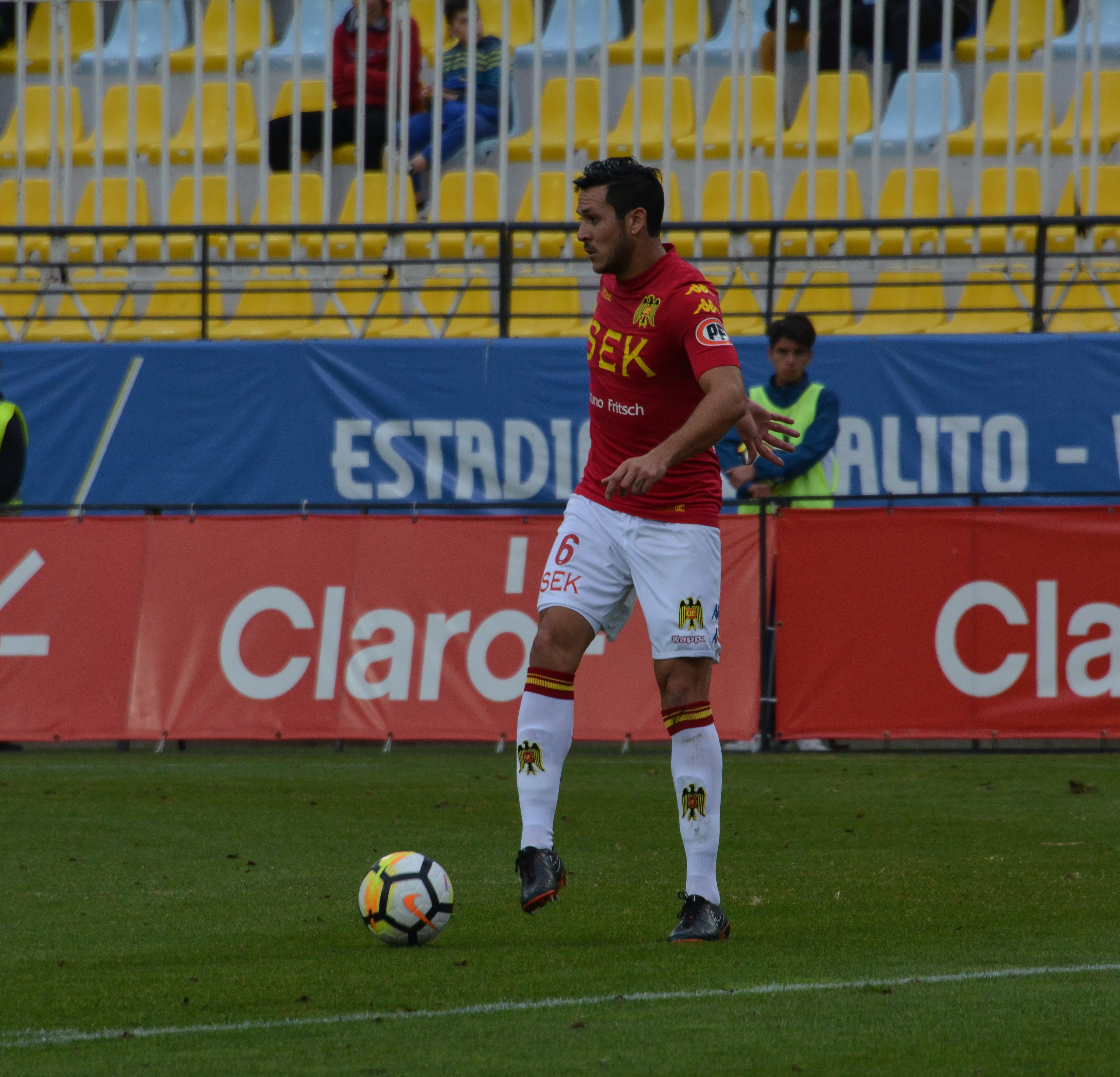 Everton v Unión Española, Estadio Sausalito, Viña del Mar, Chile.